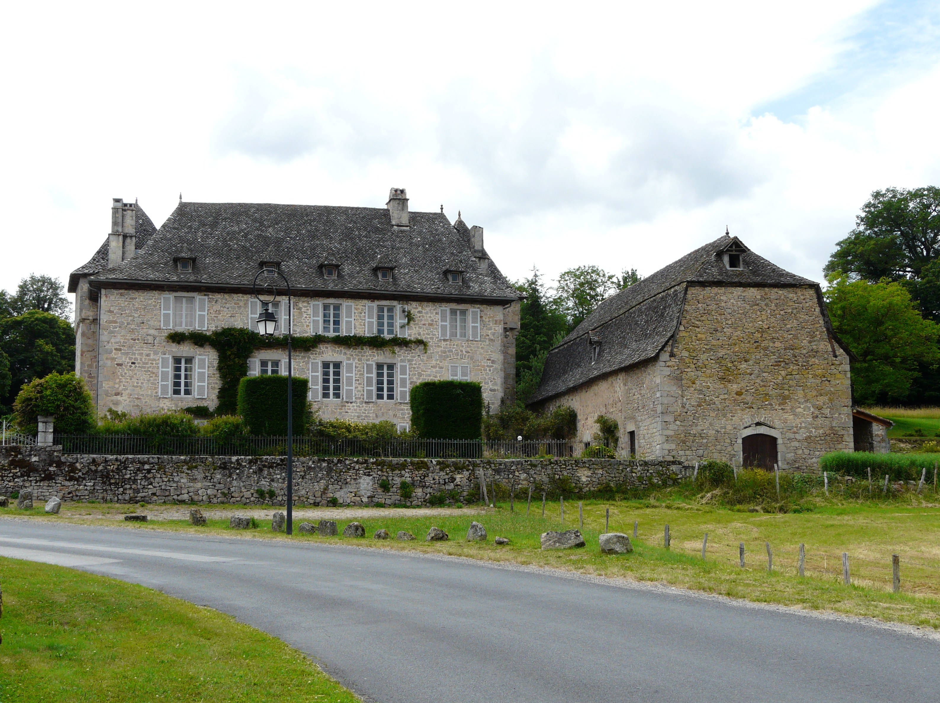 Le château de La Grillère, Glénat, Cantal, France.